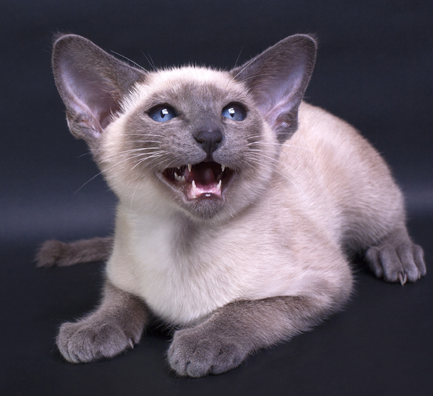 Siam Blue Point male